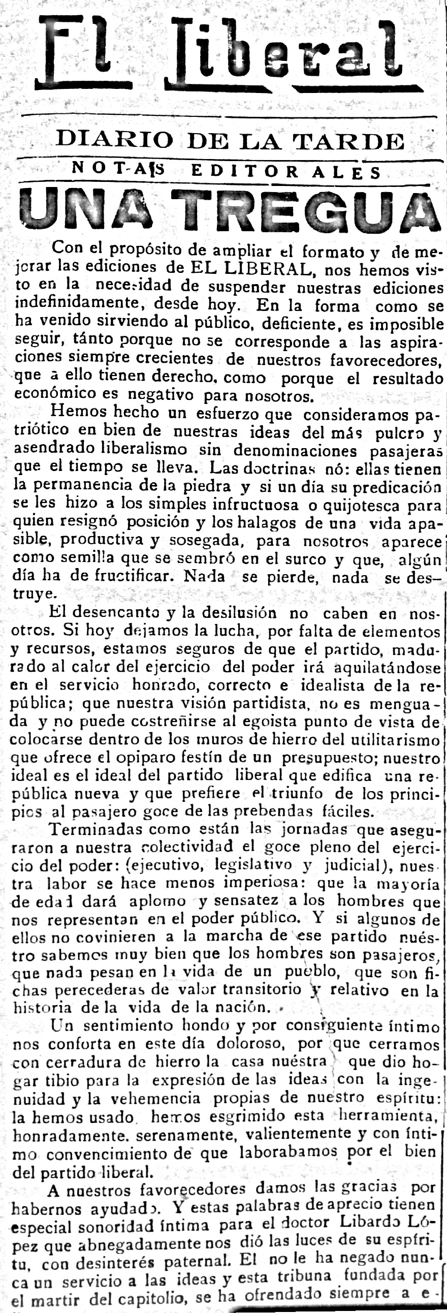 El liberal 3